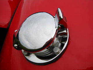 Tank, EAM Nuvolari S1 von Edelsbrunner Automobile München